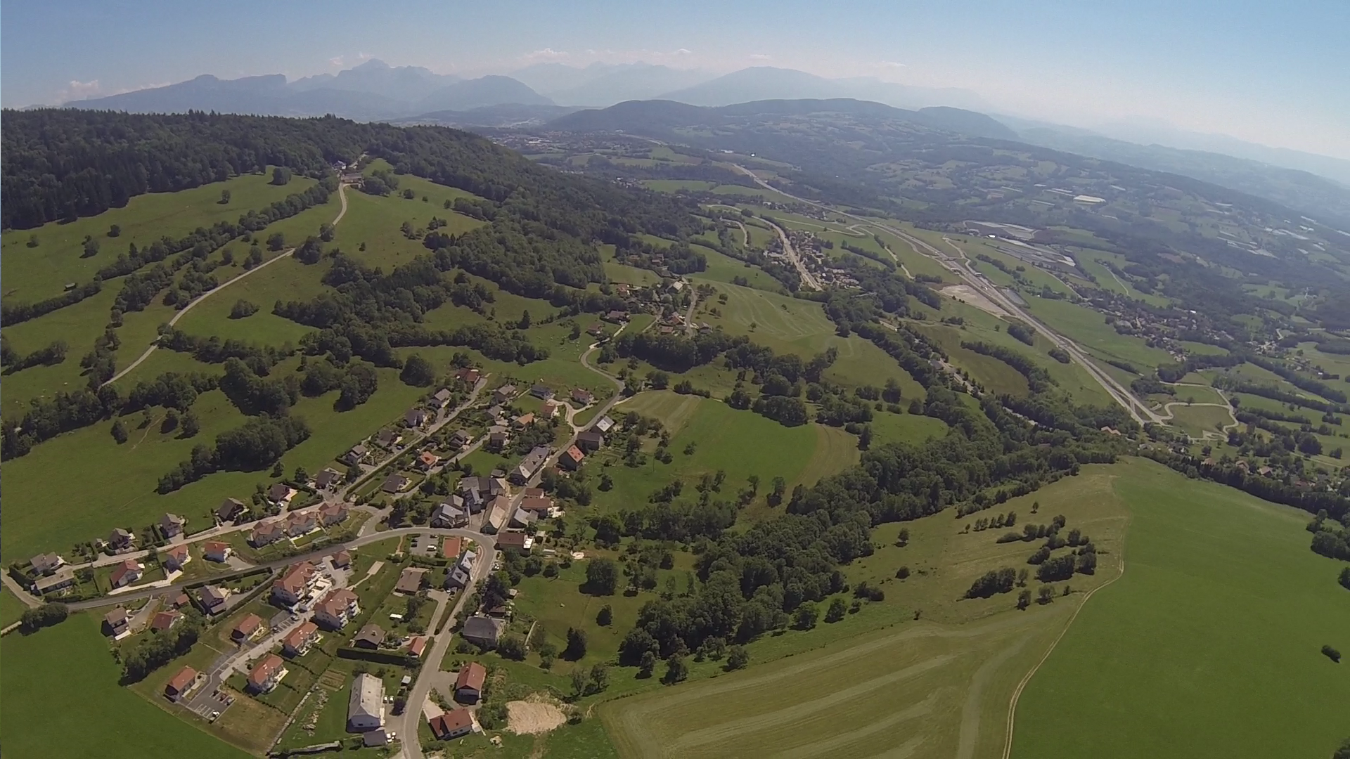 Saint-Blaise vu du ciel